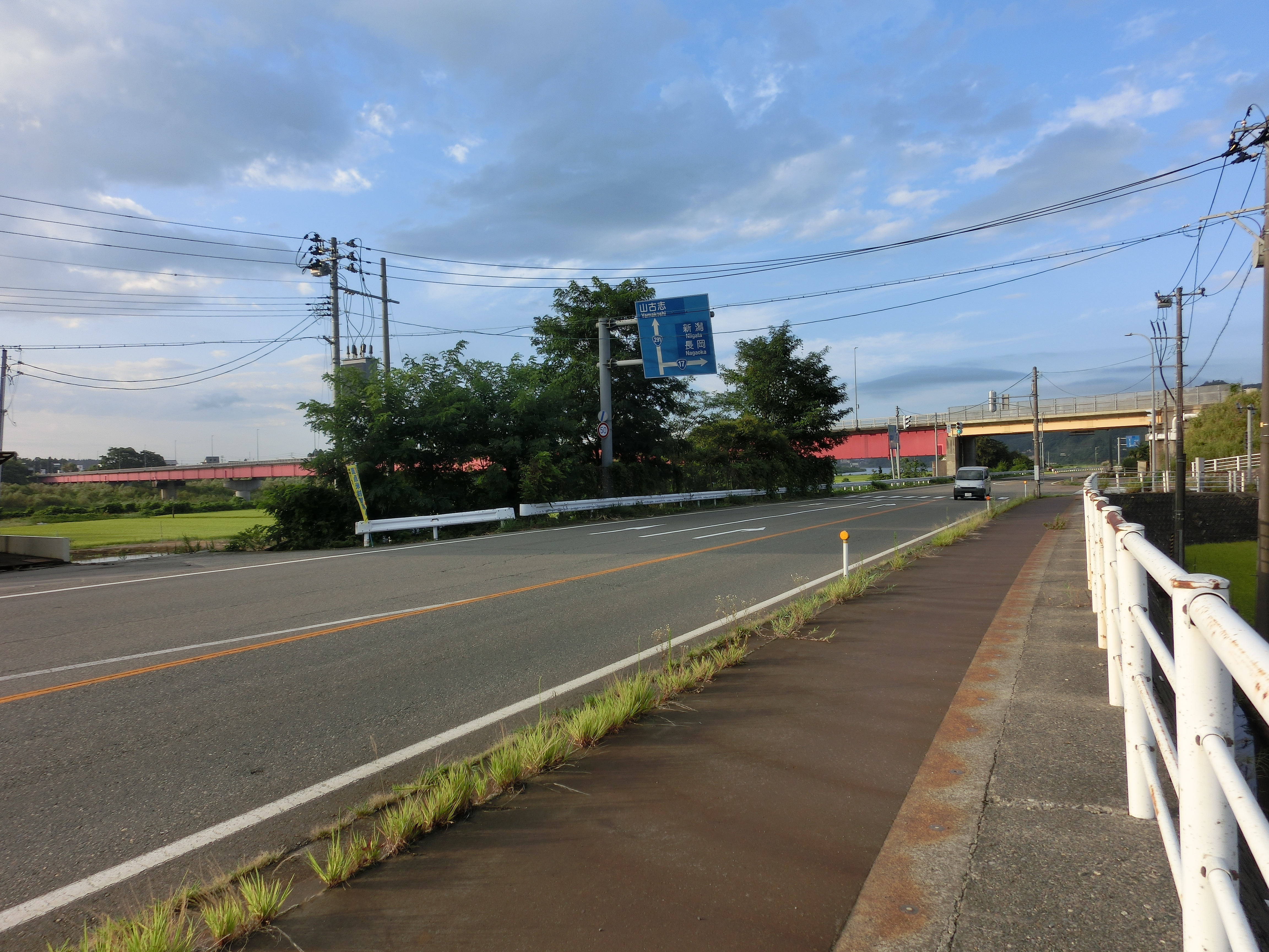 新潟県小千谷市大字薭生 国道291号線歩道上にて、小千谷大橋及び薭生インターチェンジ南西側の信号交差点を撮影。 歩道上に消雪パイプのノズルを視認できる。